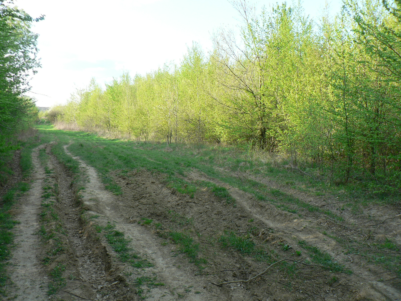 Egy sűrűbben erdősült fiatalos részlet a Kovácsi-erdőföldek délnyugati csúcsa közelében Kovácsi Forest in Buda Hills, Duna-Ipoly National Park